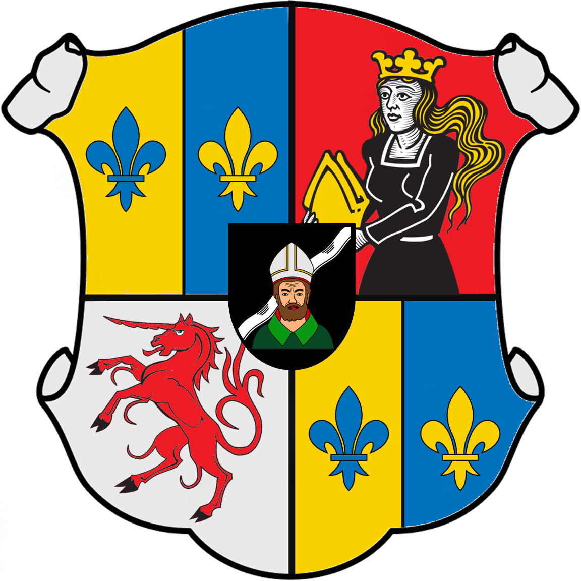 Wappen mit fünf Feldern: In der rechten Wappenseite ist oben die Mitra tragende Mohrin der Grafen von Kirchberg zu sehen. Punktsymmetrisch zueinander sind nach Vorbild des Wappens von Hans Jacob Fugger zu Kirchberg und Weißenhorn oben links und unten rechts zwei Lilien auf gelbem bzw. blauem Grund zu finden. Links findet sich in der unteren Wappenhälfte das rote Einhorn der Ulmer Patrizierfamilie Roth. Als Zeichen der Eingemeindung 1972 nach Vöhringen und der Nähe zur Iller ist eine der im Vöhringer Wappen vorzufindende Illerabbildung mit Hundertpfunds Ulrichsdarstellung aus der örtlichen Kirche im Zentrum des ehemaligen Kirchdorfs im Zentrum zu erkennen.